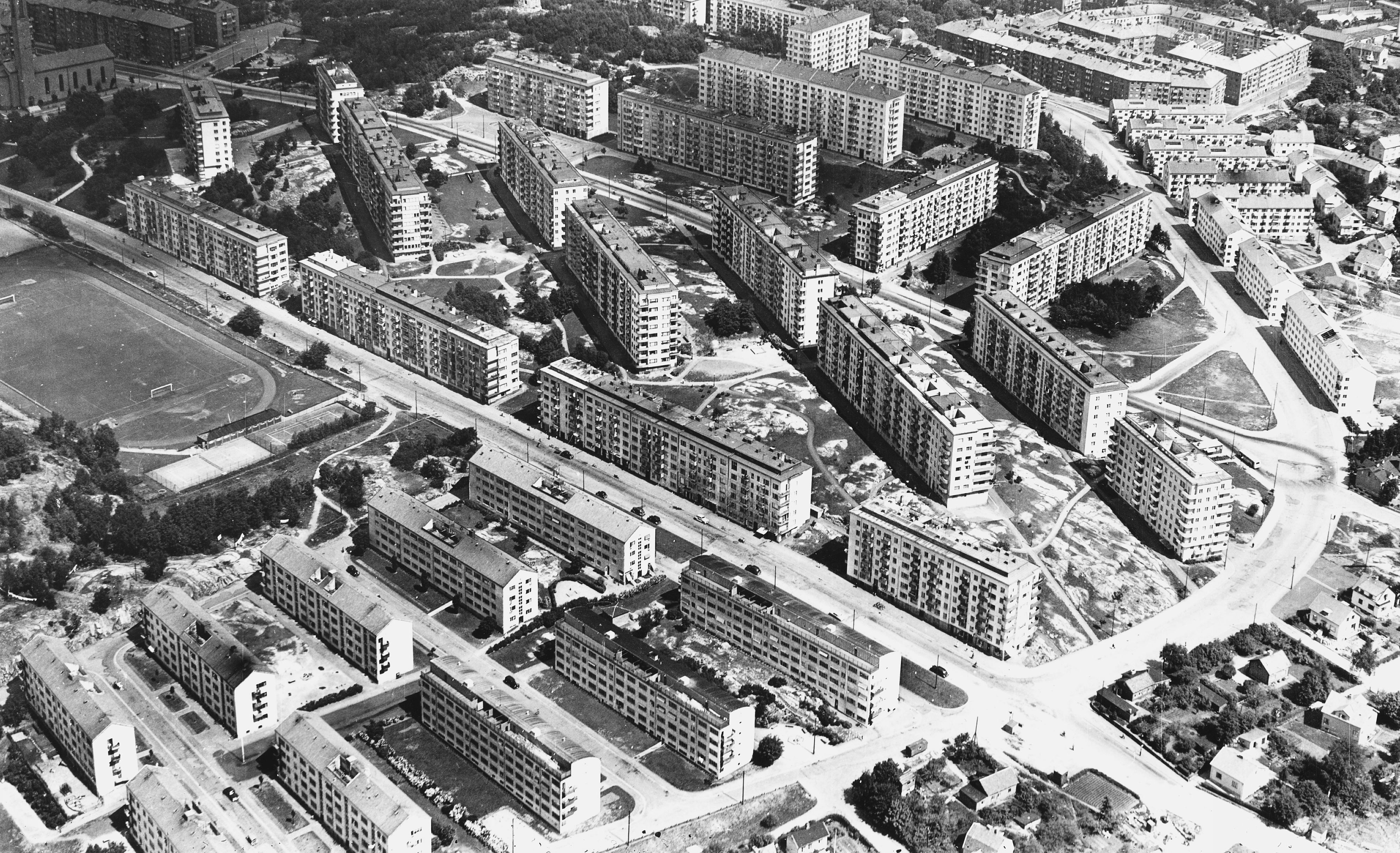 Flygfoto över Johanneberg i Göteborg. Högst upp till vänster skymtar Johannebergskyrkan och högst upp i mitten Johannebergs vattentorn. Den stora svängande vägen till höger är Eklandagatan, den stora vägen som löper diagonalt över bilden är Gibraltargatan.